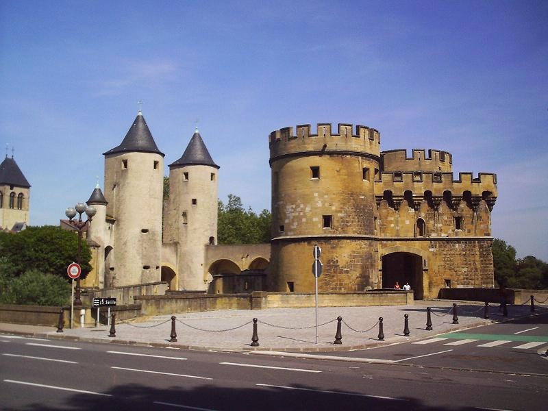 La porte des allemands aujourd'hui.